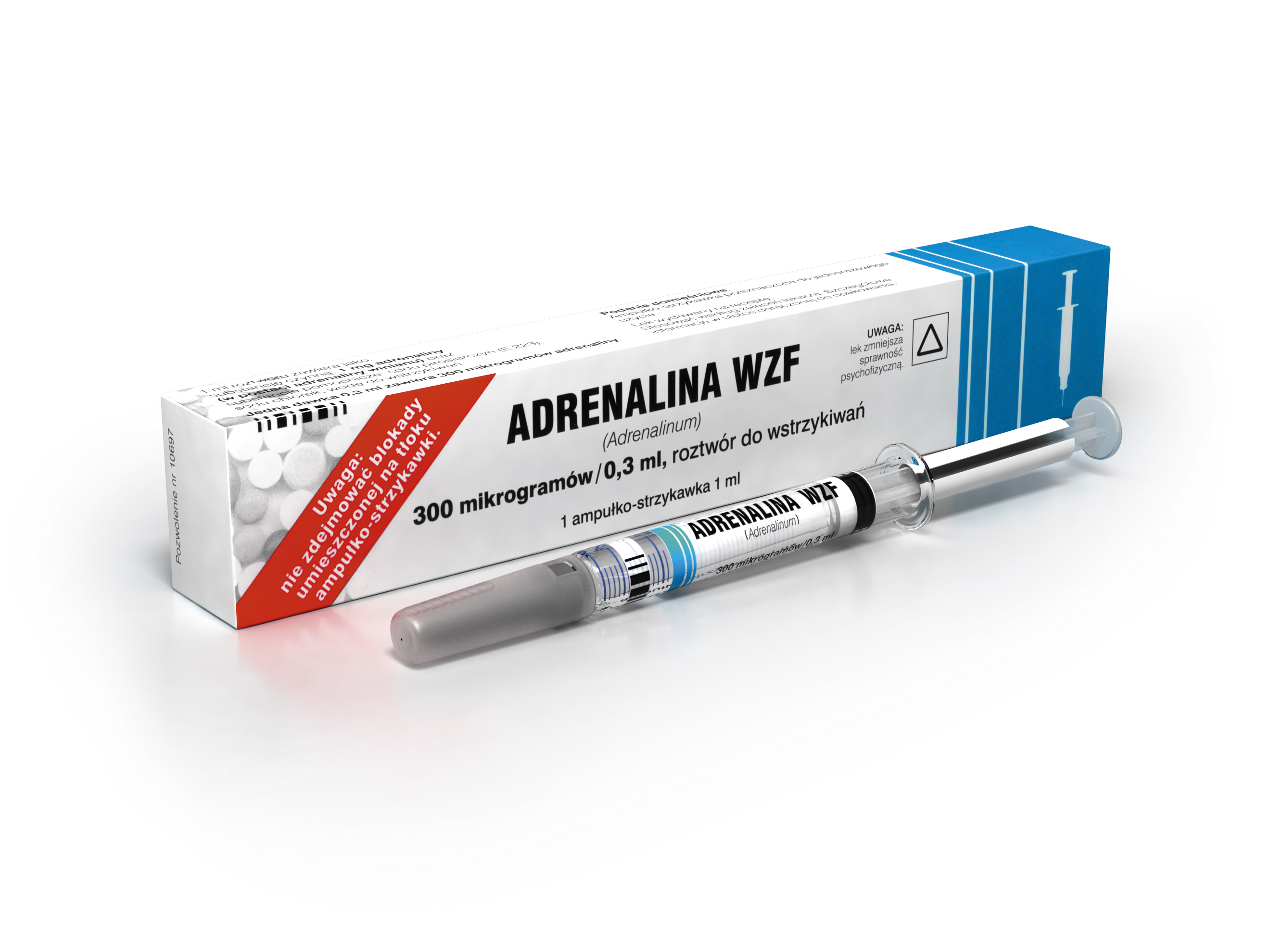 Współczesna strzykawkoampułka z adrenaliną